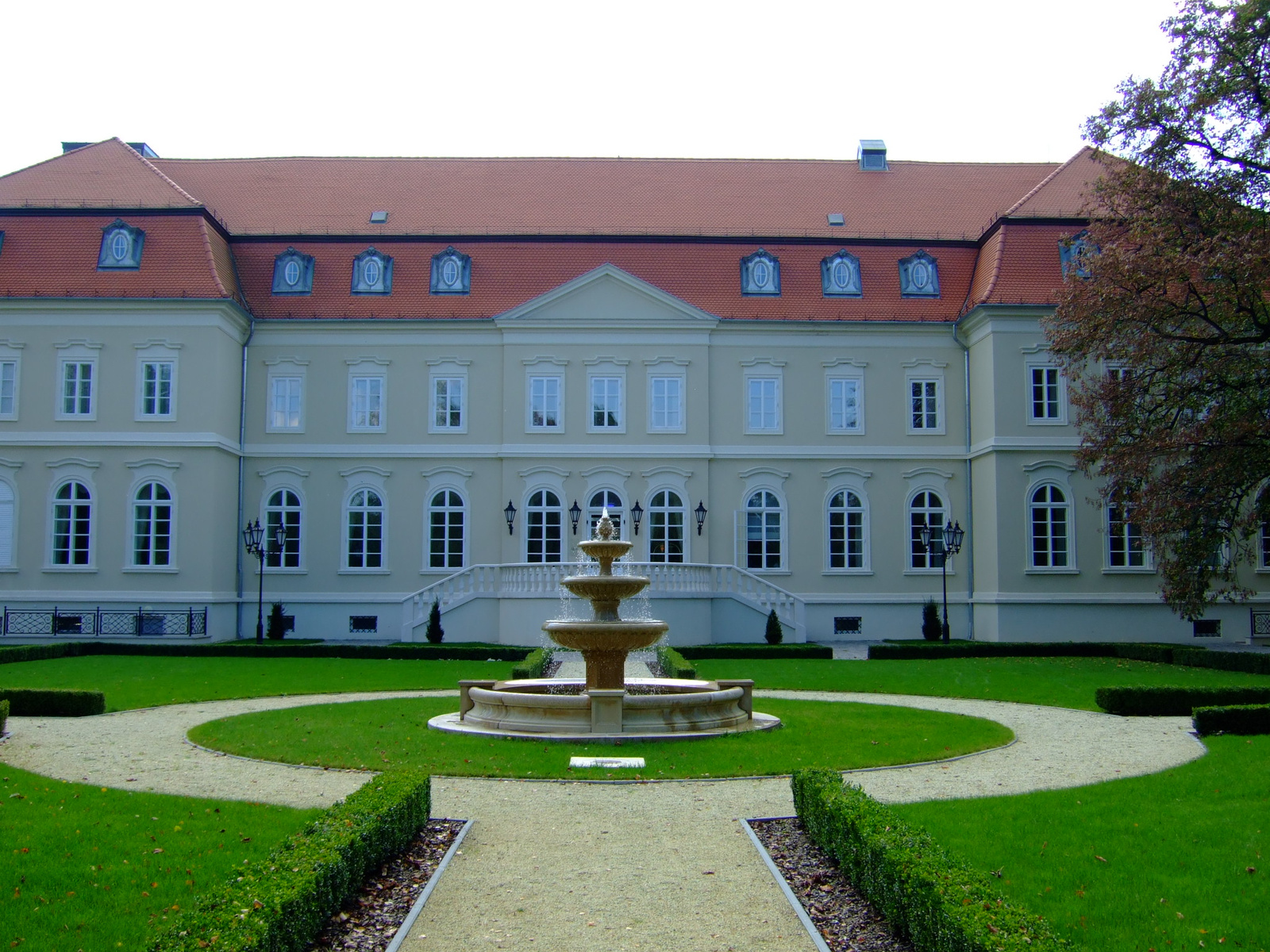 Erdődy-Pallavicini kastély (Szilvásvárad, Park u.) This is a photo of a monument in Hungary. Identifier: 5856